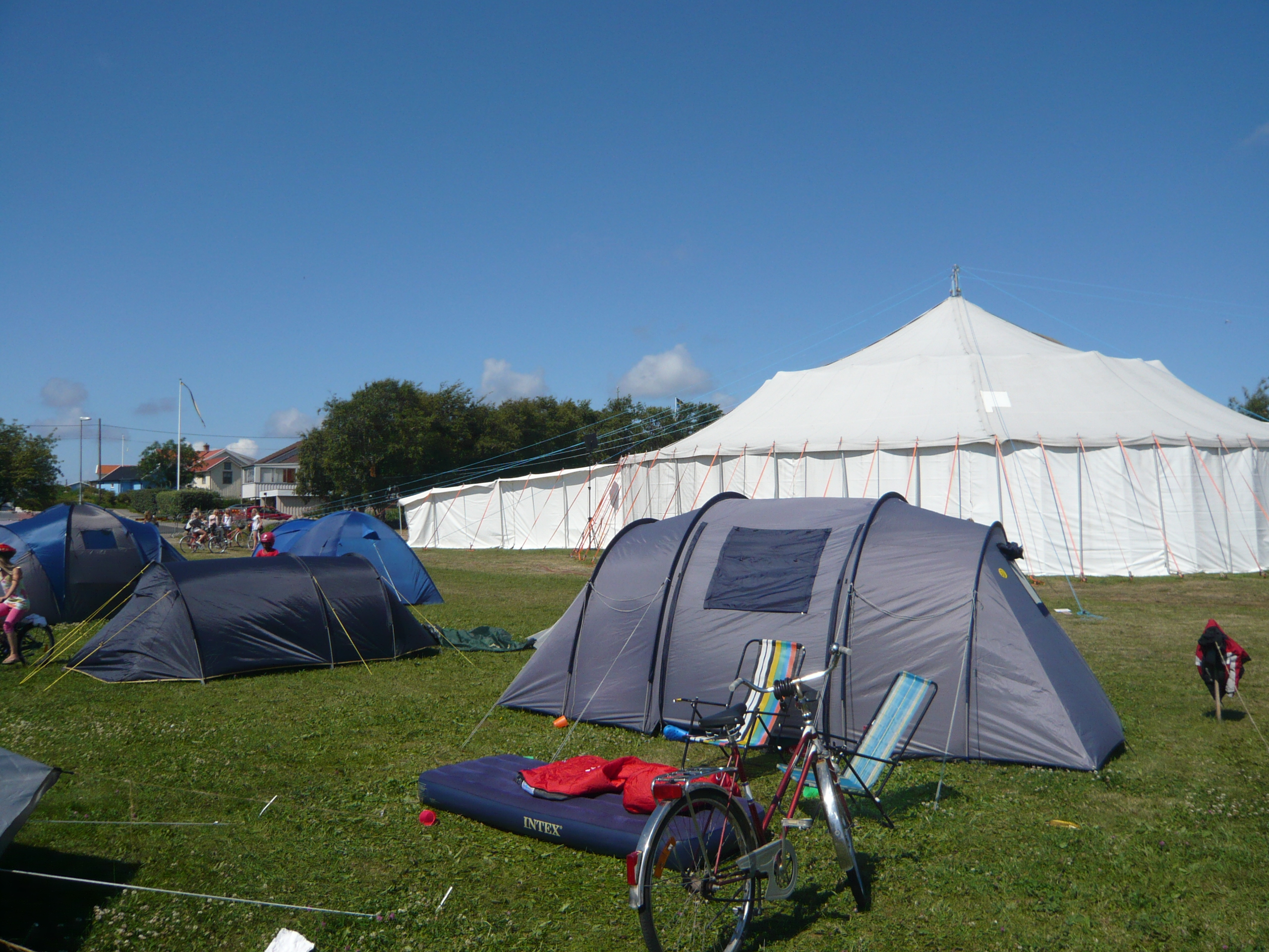 Hönökonferensen, mötestältet